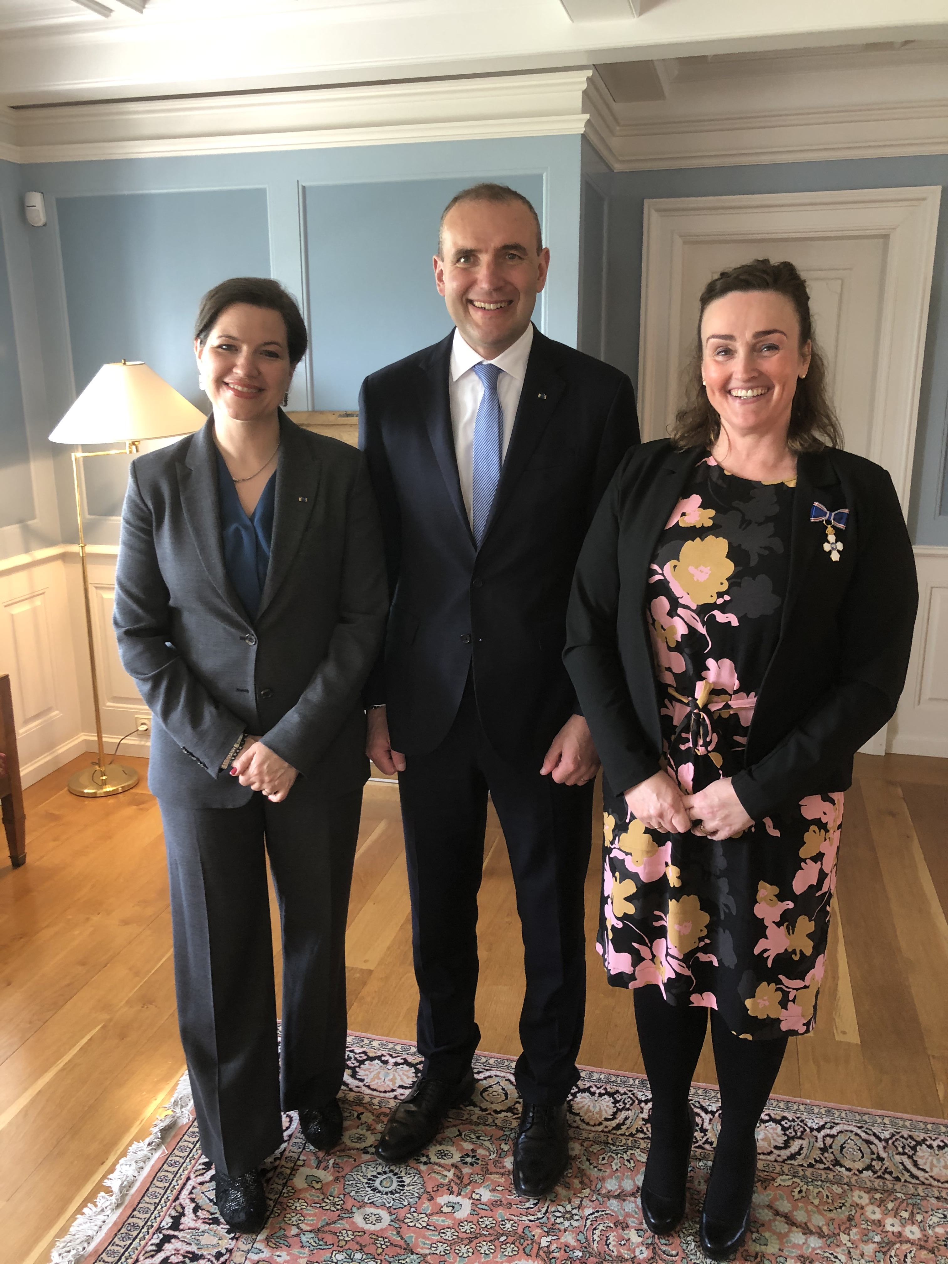 Sigrún Þuríður með forseta Íslands, hr. Guðna Th. Jóhannessyni og Elizu Reid forsetafrú